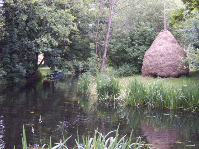 Detail (Heuschober und Fließ) der Schlossinsel in Lübben, Land Brandenburg, Deutschland Bild aufgenommen am 18.6.2006 von Olaf Meister